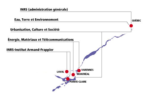 Carte indiquant les différentes composantes du réseau de l'Institut national de la recherche scientifique, composante de l'Université du Québec.